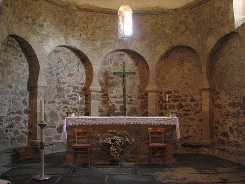 Santo Tomás de las Ollas, Ponferrada, León: interior. Ábside.